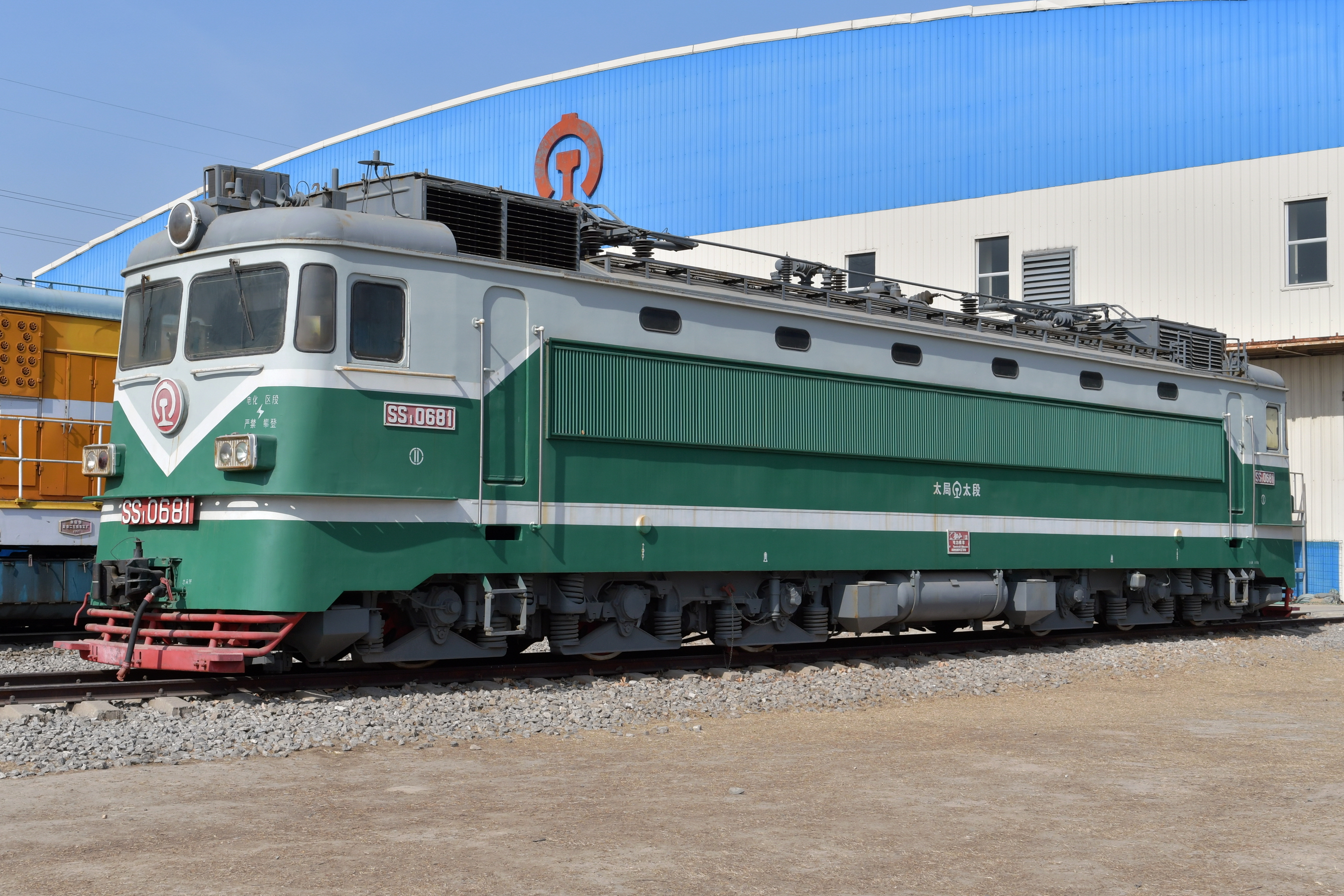 韶山1型0681号电力机车，太原铁路局捐赠，保存在中国铁道博物馆。